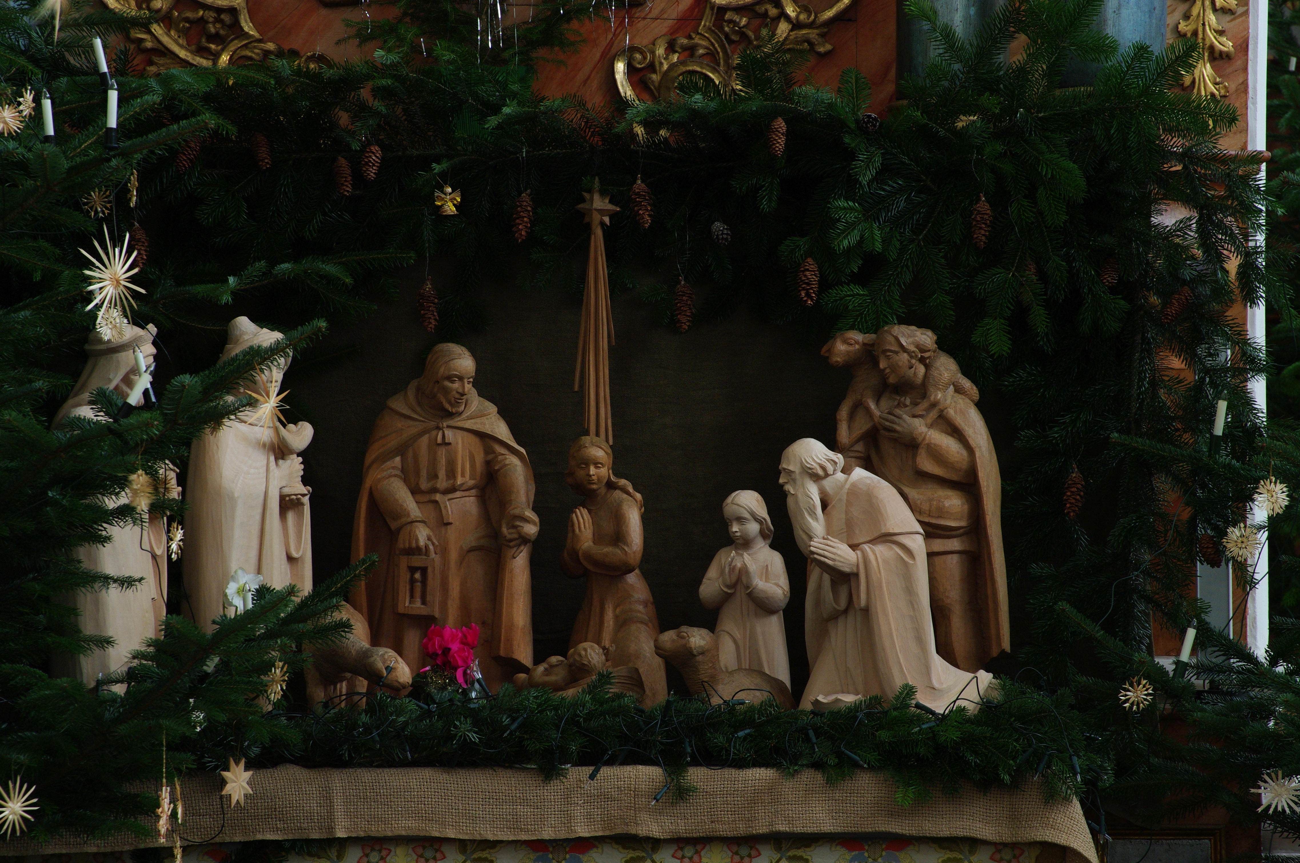 Die Krippe am linken Seitenaltar